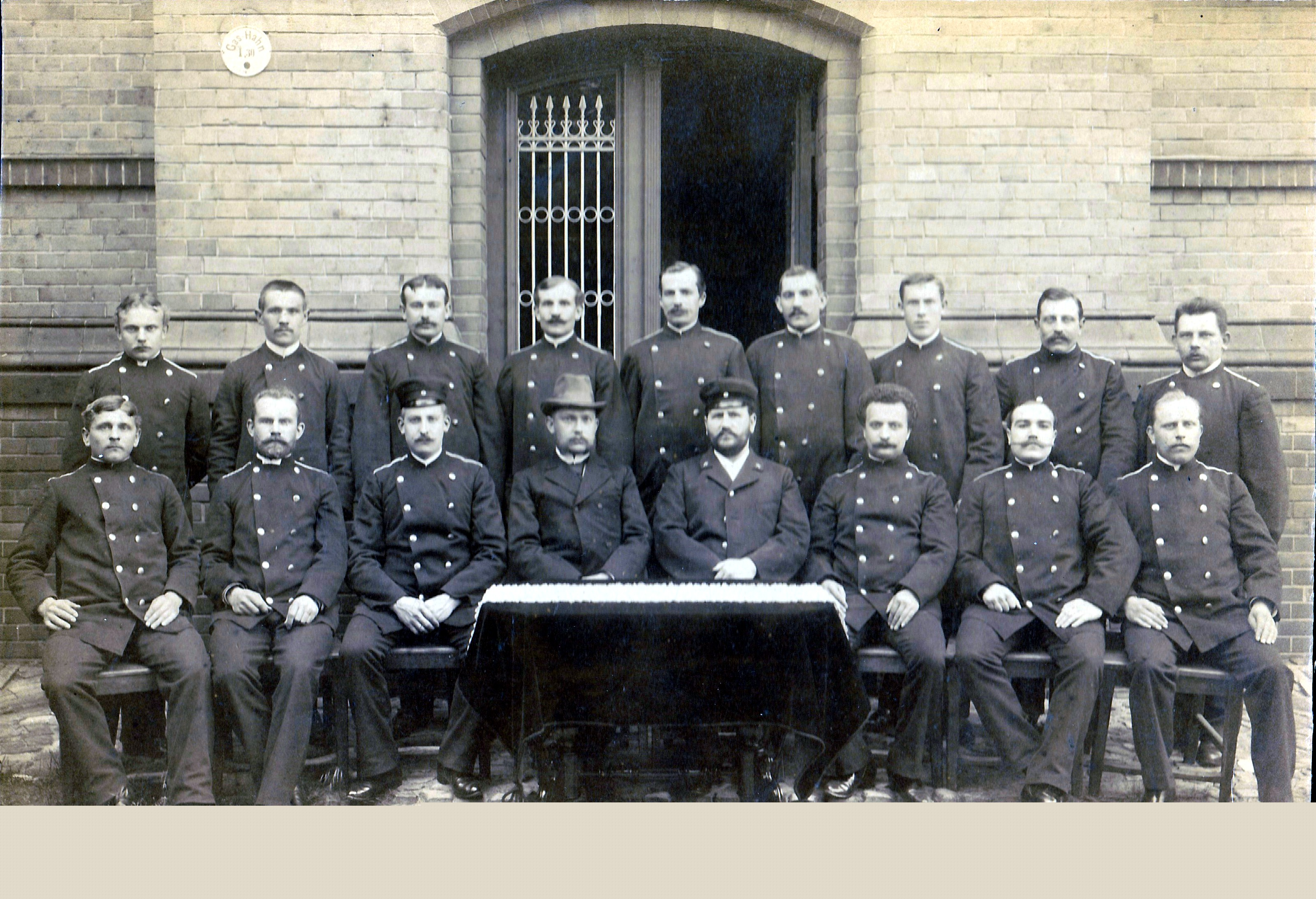 Gruppenfotografie von Krankenpflegern der Irrenanstalt der Stadt Berlin zu Dalldorf im Jahr 1903